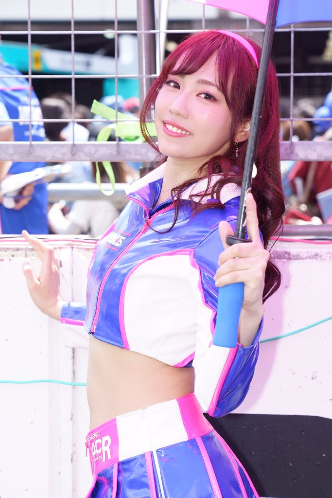 Seiko Kirishima